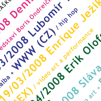 Vyrez plakatku pro prednaskovy cyklus